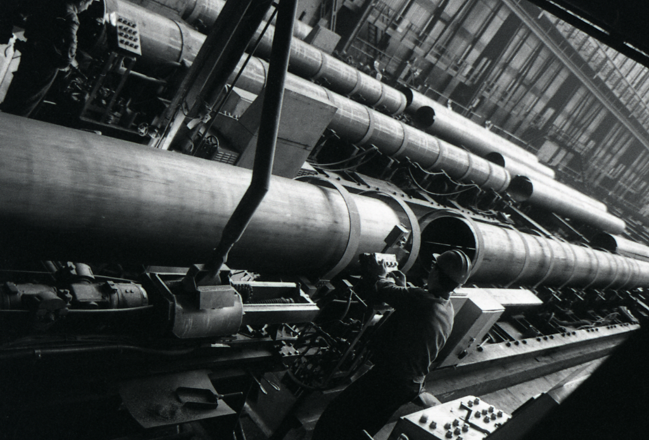 Servizio fotografico : Taranto, 1964 / Paolo Monti. - Strisce: 6, Fotogrammi complessivi: 36 : Negativo b/n, gelatina bromuro d'argento/ pellicola ; 35 mm. - ((I fotogrammi hanno una doppia numerazione. - Sul portanegativi: Leica HPS. - Fonte: Agenda di Paolo Monti: Foto Leica 2 / 111 - 285 (1934-1965), presso Archivio Paolo Monti